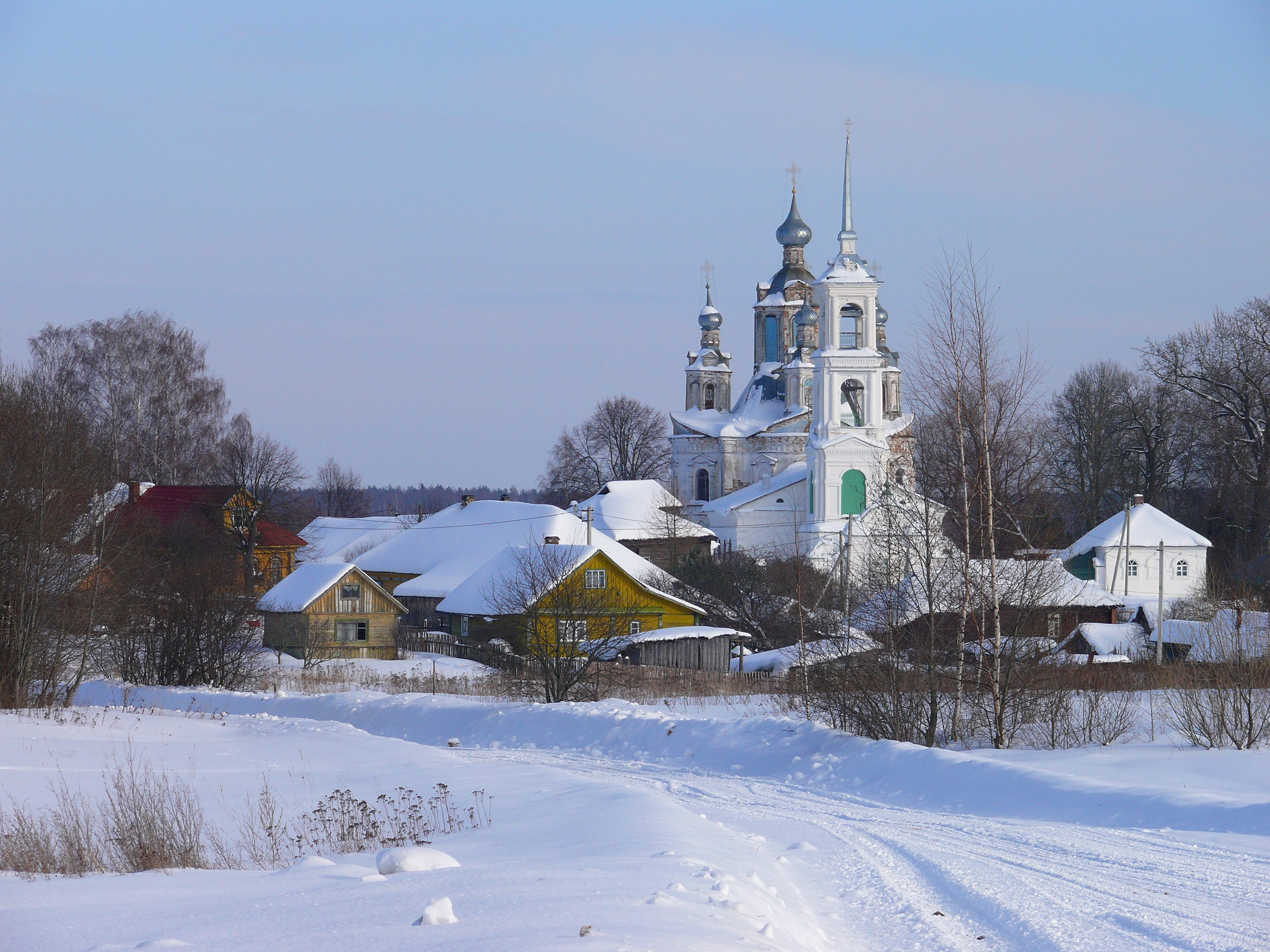 Церковь Троицы (Ярославская область, Мышкин, село Верхне-Никульское)